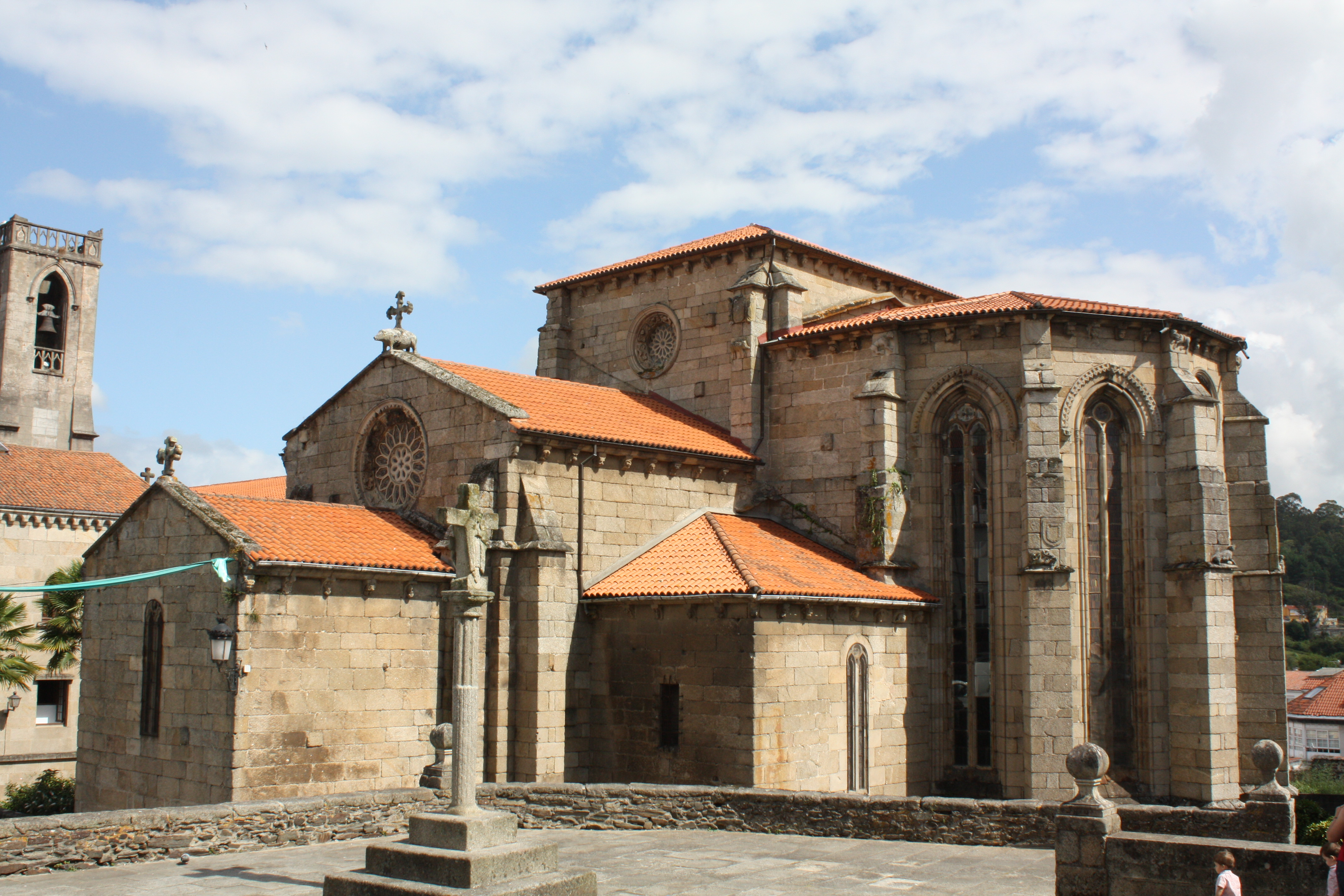 Igrexa de San Francisco (Betanzos, A Coruña).